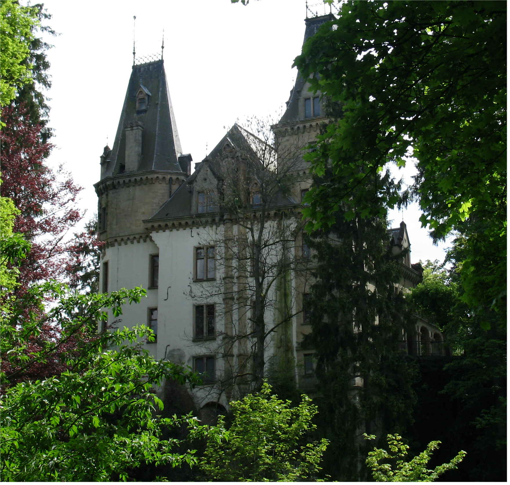 Schlass Meesebuerg.